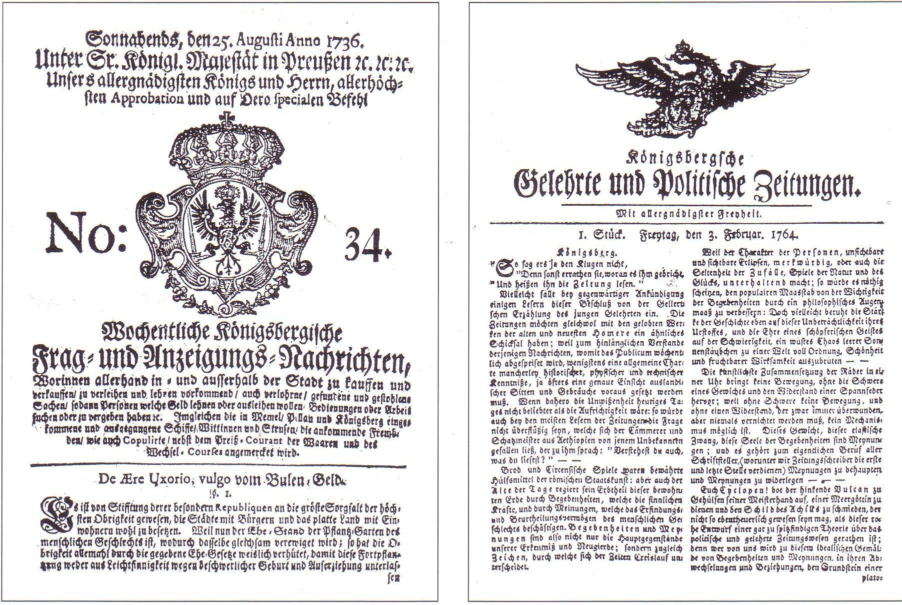 Zwei Königsberger Zeitungen des 18. Jahrhunderts